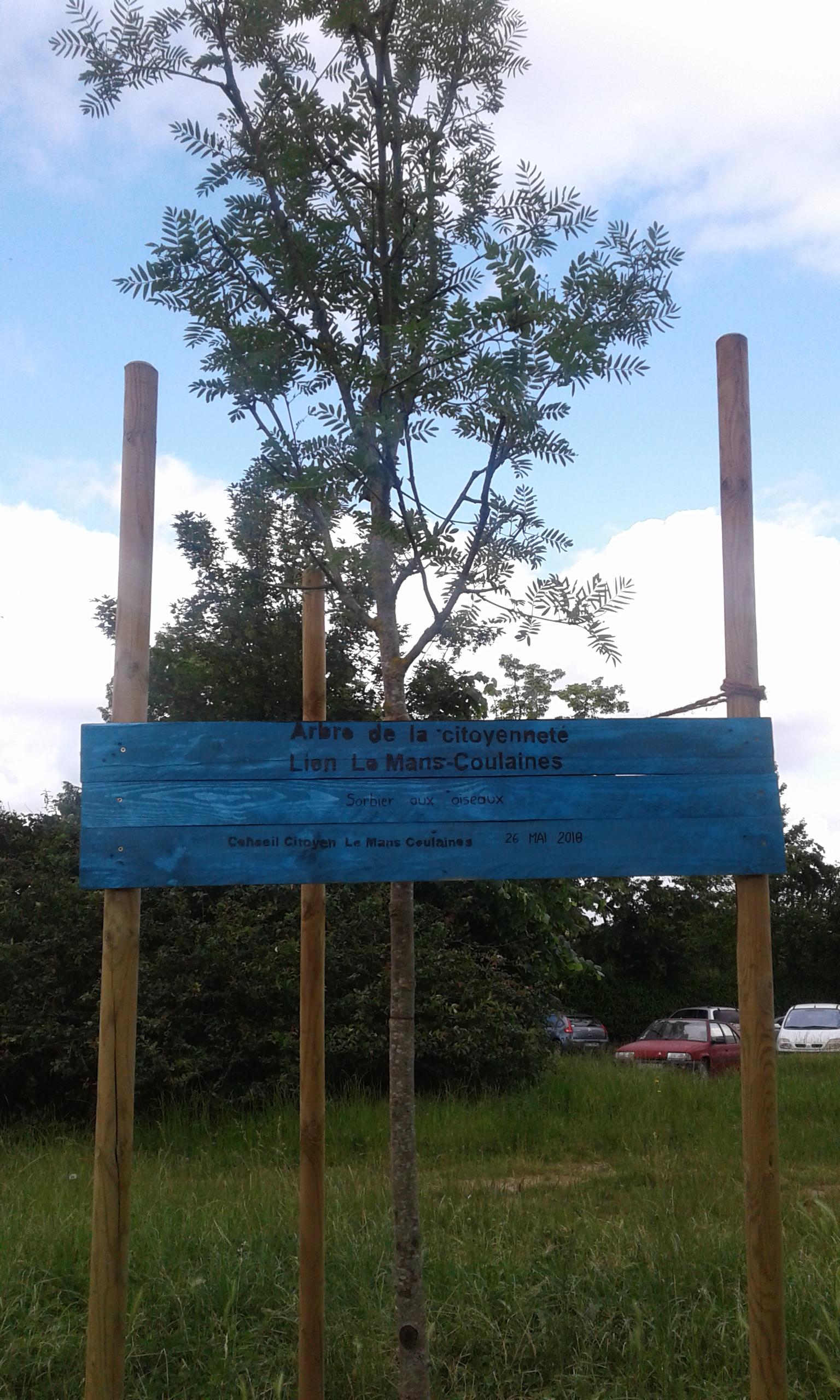 Arbre de la citoyenneté - Coulaines 72190 - 23 mai 2018 - conseil citoyen Bellevue Carnac